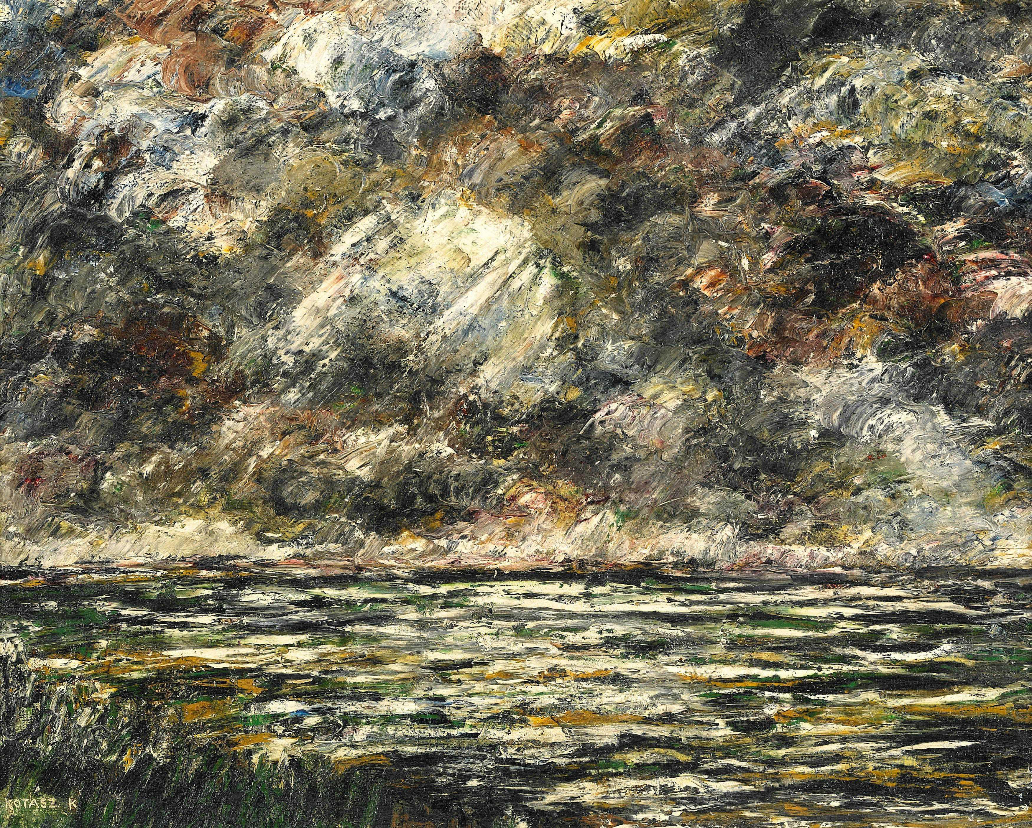 Balaton. Öl auf Malkarton. 34 x 44,5 cm. Signiert unten links: Kostász K.